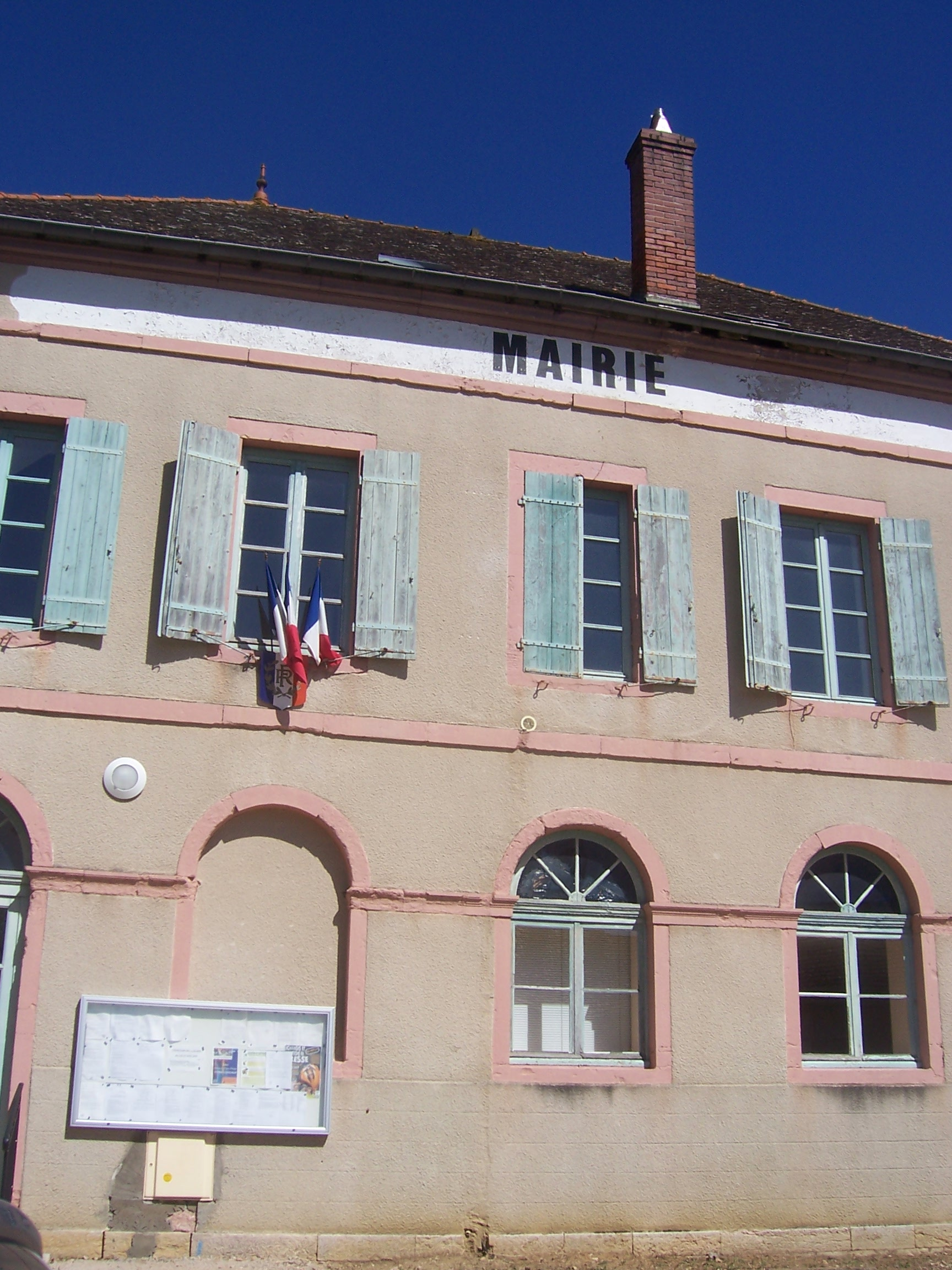 Mairie de Ratenelle